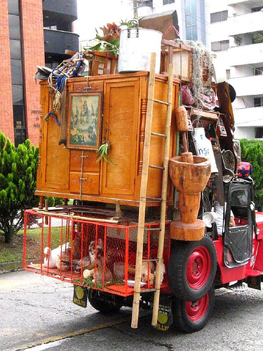 Representacion exacta de los viejos metodos de trasteo... pero no obsoletos .... todo se puede encontrar hay colgado ..... cultura 100% paisa. Fiestas de la cosecha de Pereira - 2006